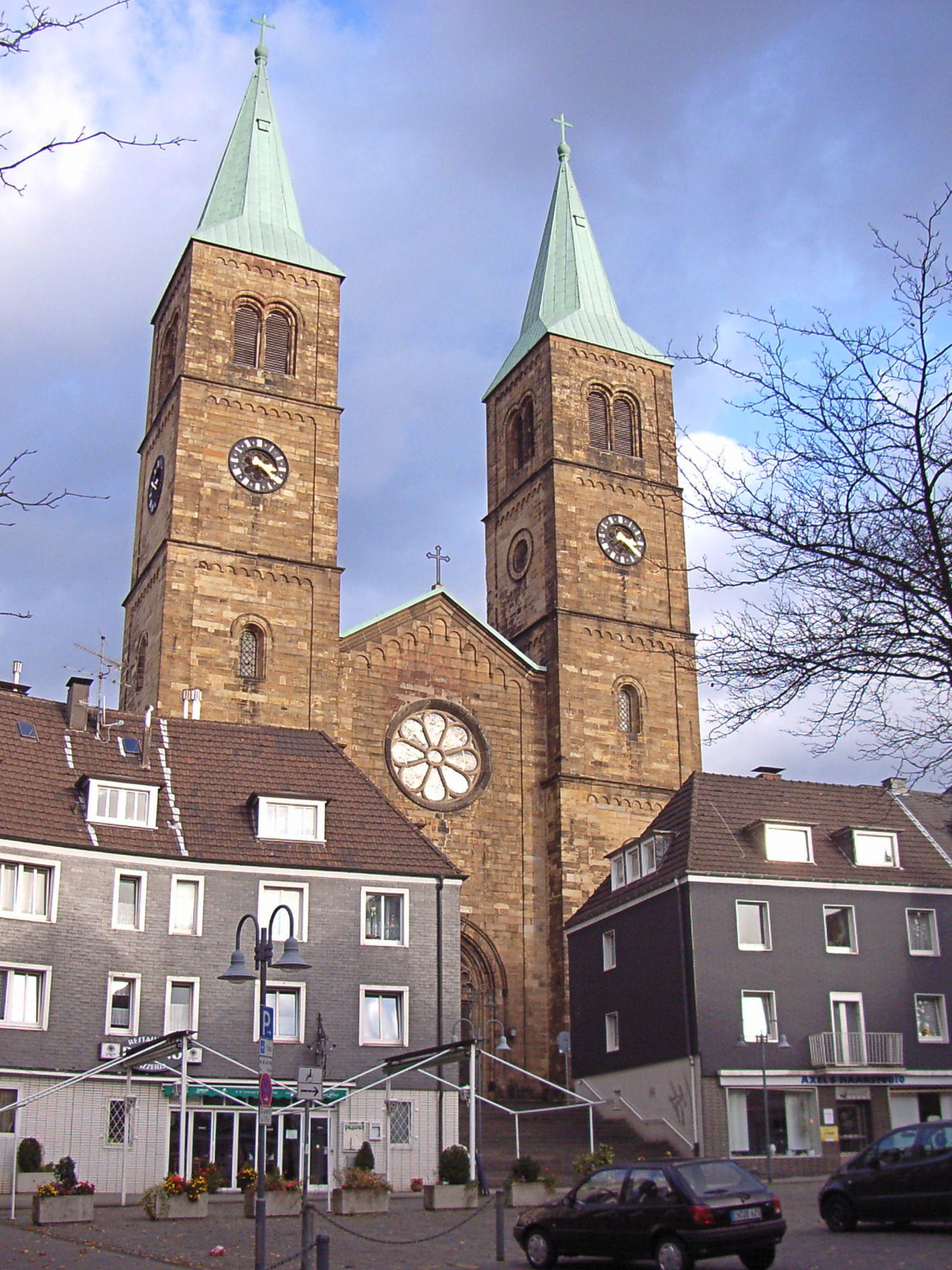 Blick vom Altmarkt auf Christuskirche in Schwelm (NRW, Deutschland)